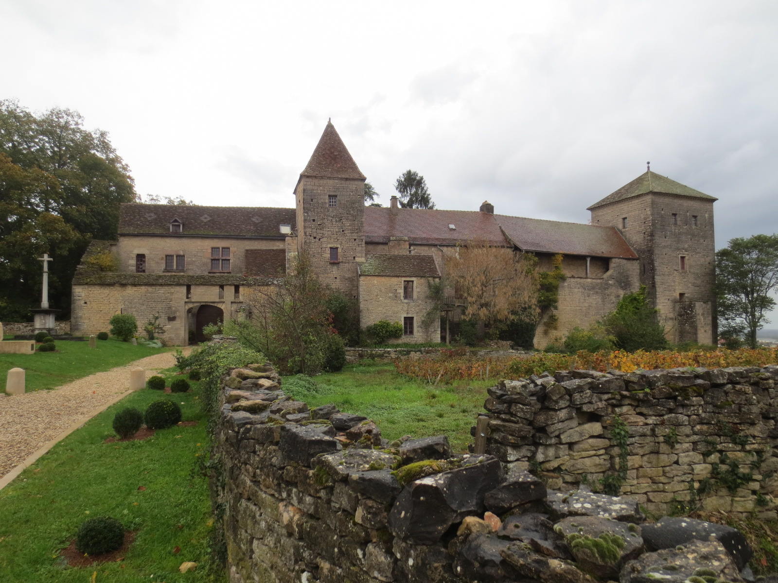 Château de Gevrey-Chambertin